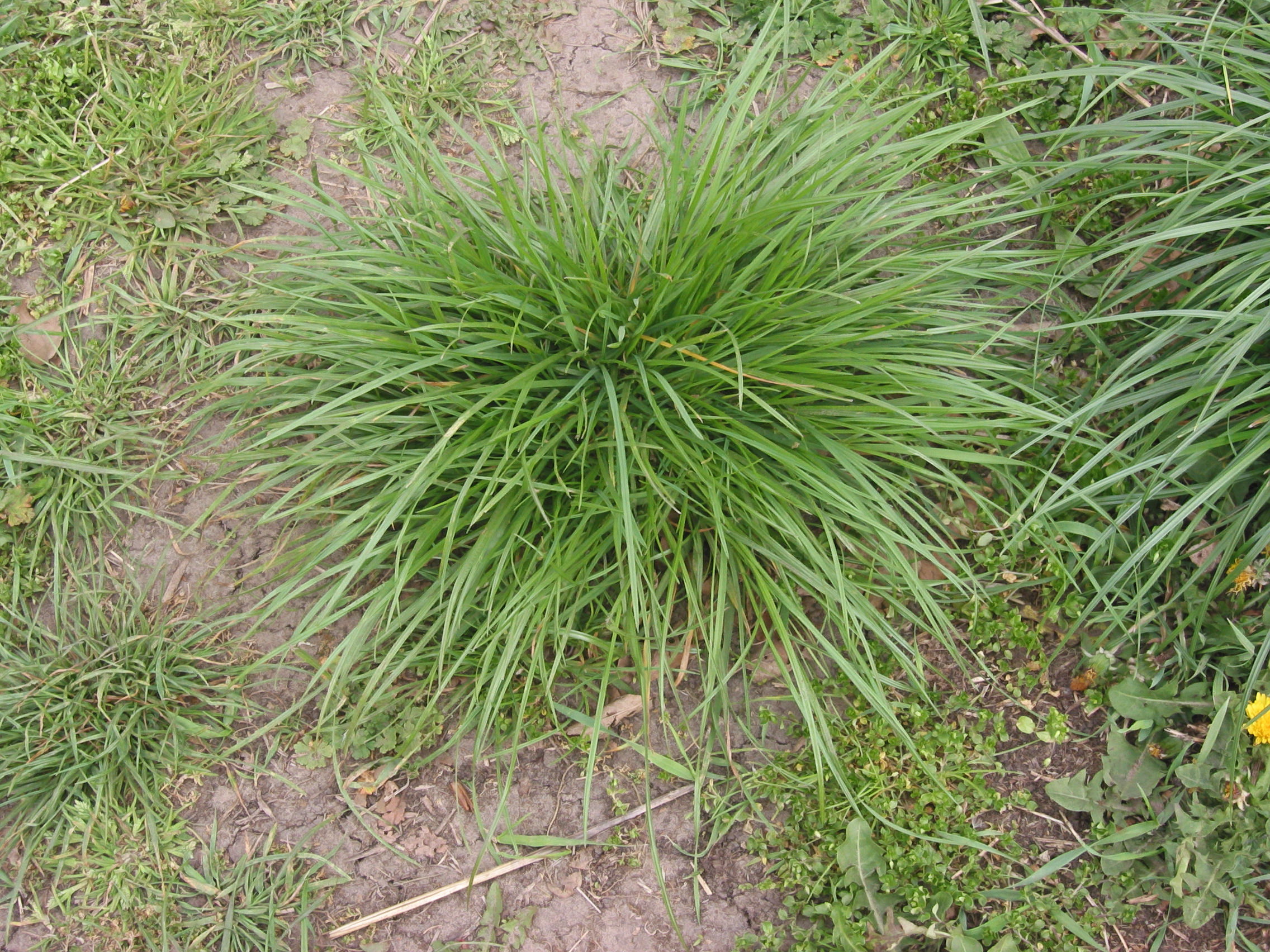 (nl: Engels raaigras plant) Lolium perenne single plant